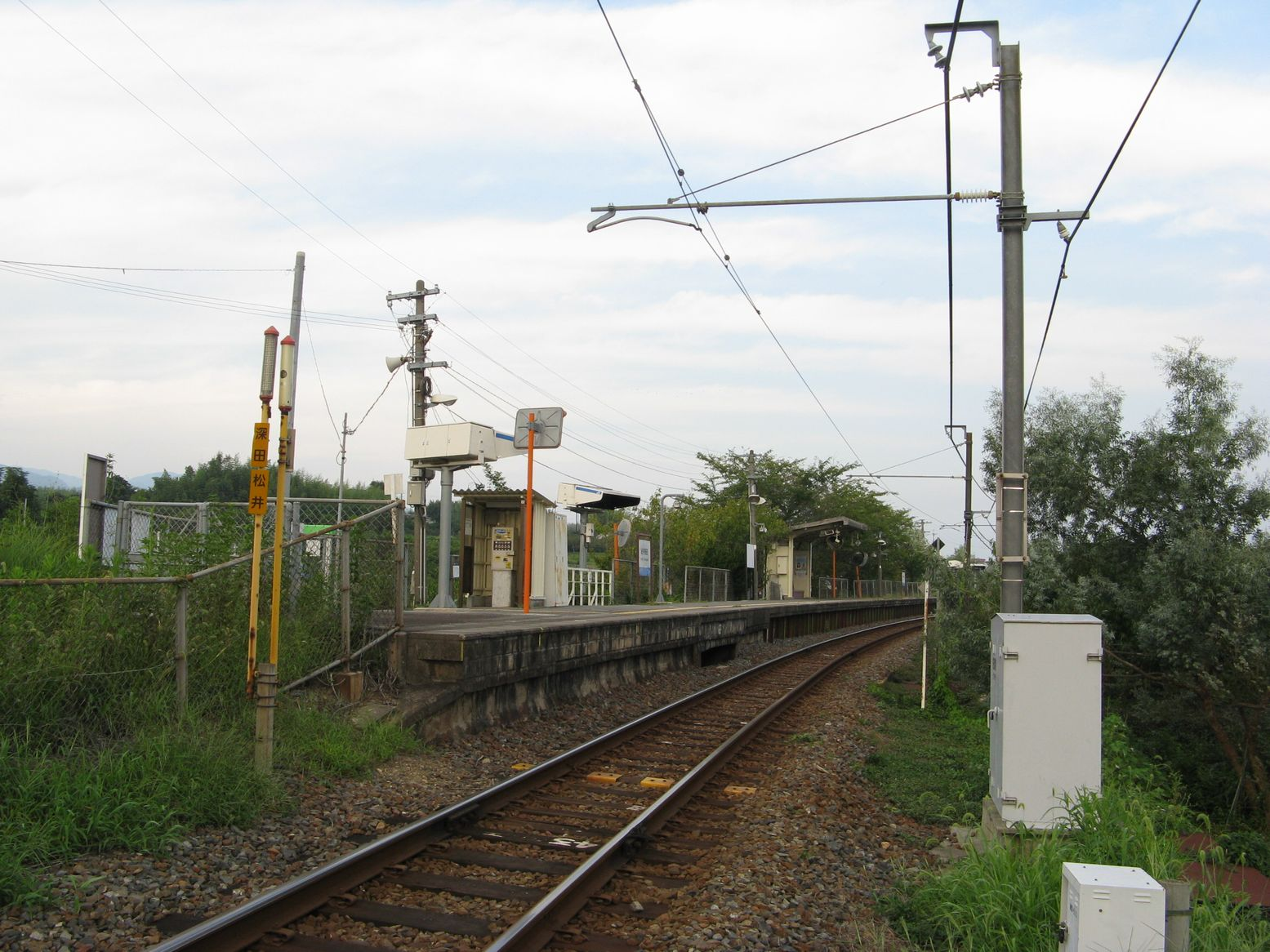 紀伊長田駅